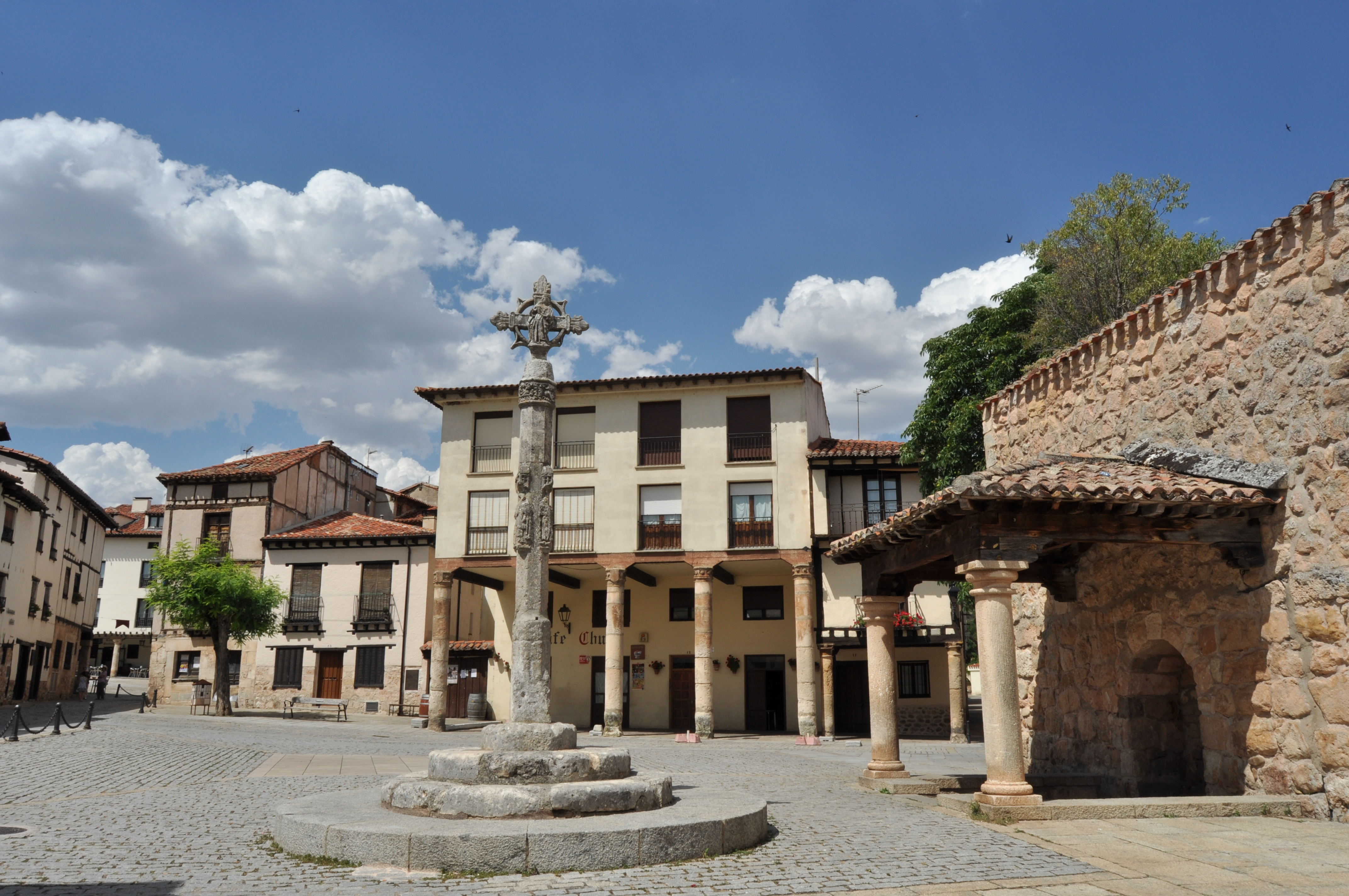 Covarrubias - 030